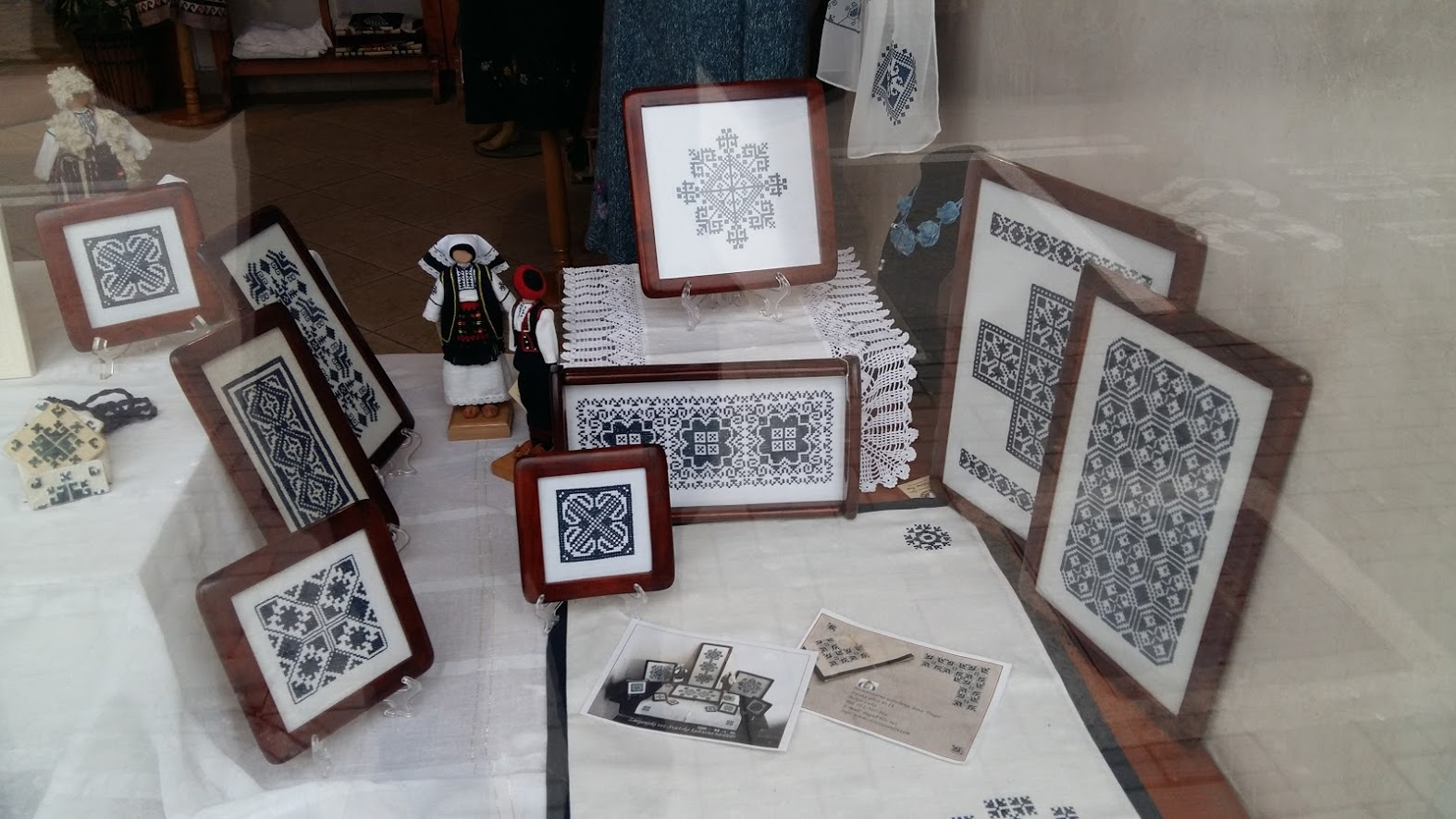 Zmijanje embroidery in store in Banja Luka